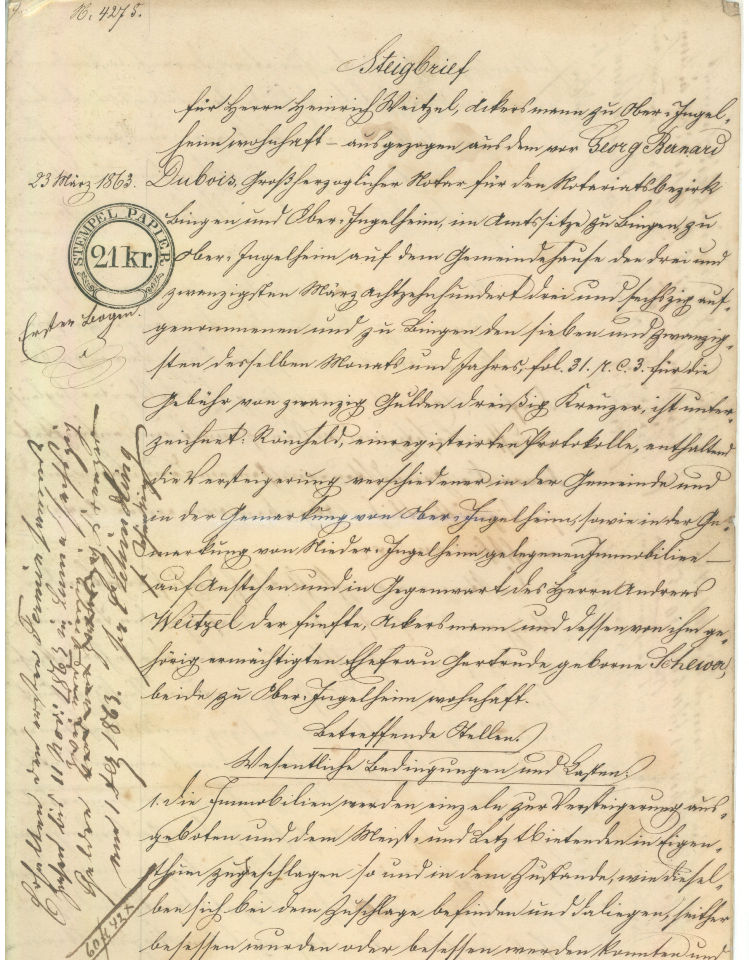 Beispiel für einen Steigbrief aus dem Jahre 1863.